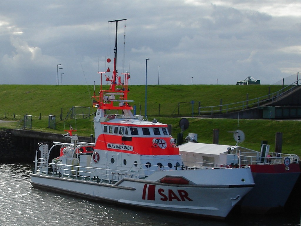 DGzRS Seenotrettungskreuzer Hans Hackmack